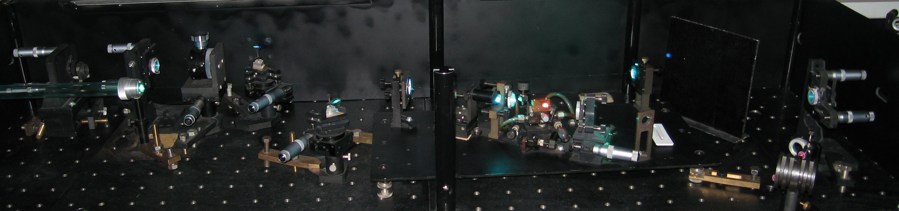 Фемтосекундный лазер третьего поколения (Ti:сапфир) 3rd generation Ti:Sapphire laser produced 50 fs pulses at 800 nm